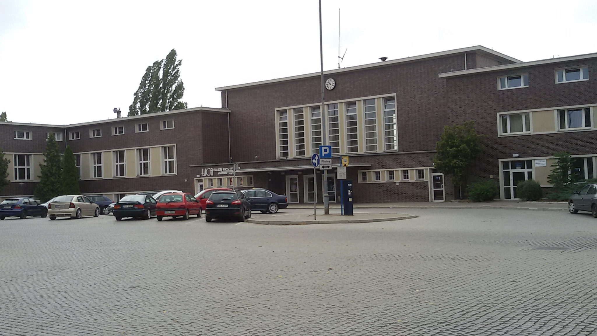 Głogów, Poland